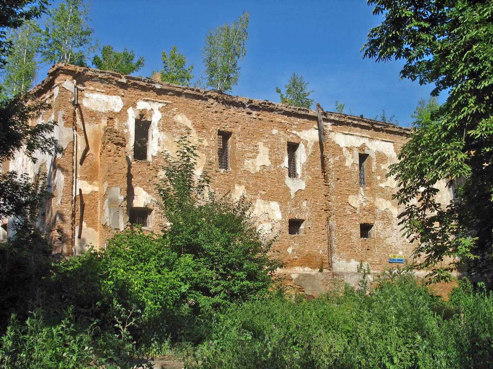 Келії єзуїтського монастиря Житомир